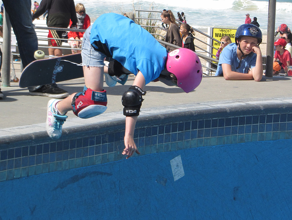 Lost it.